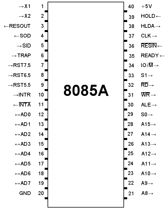 Anschlussbelegung des 40-Pin-DIL-Package des Intel 8085